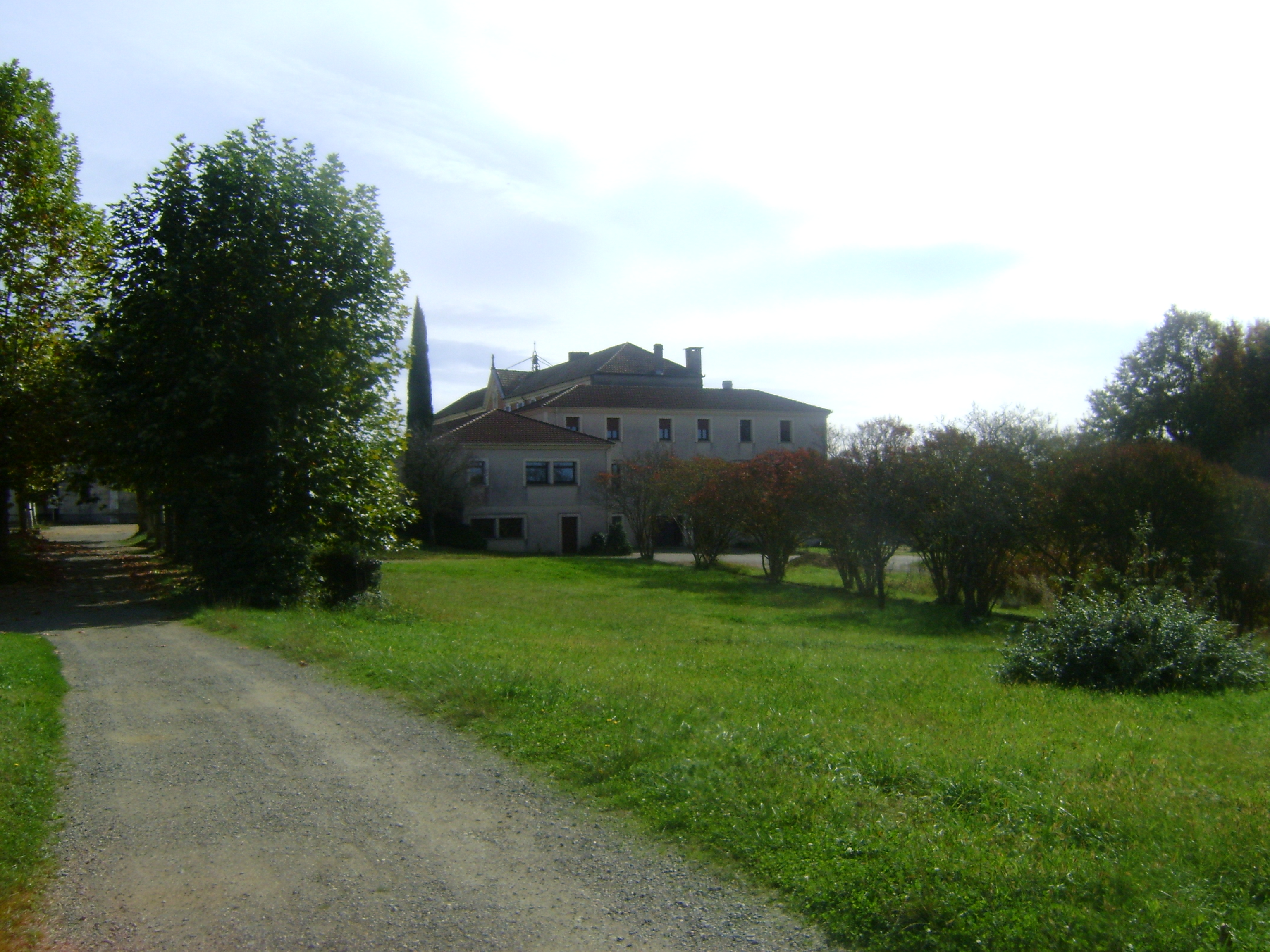 Bâtiments conventuels de l'abbaye Notre-Dame de Maÿlis (Landes)